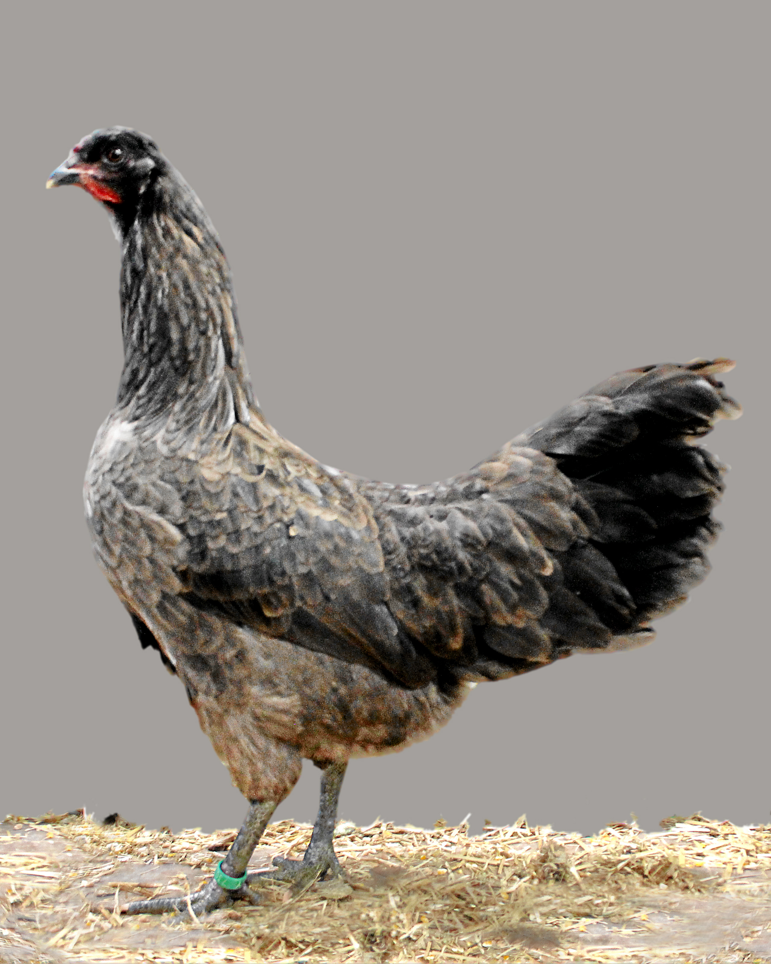 Schijndelaar Henne, schokoladenbraun